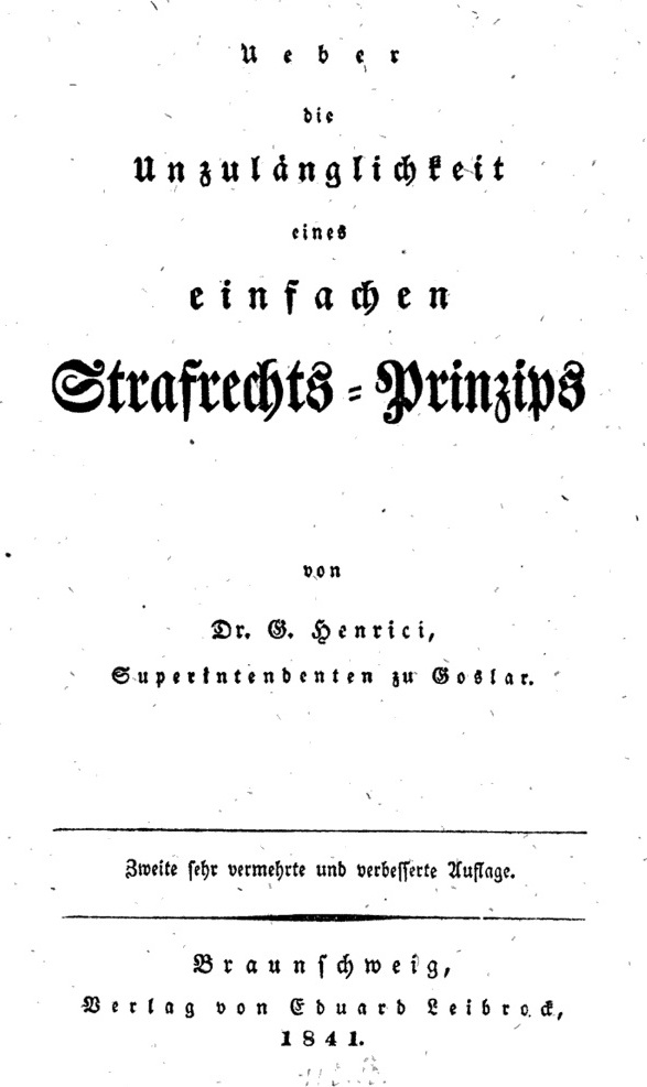 Georg Heinrich Henrici: Über die Unzulänglichkeit eines einfachen Strafrechts-Prinzips, zweite, vermehrte Auflage, Braunschweig 1841, Titelseite